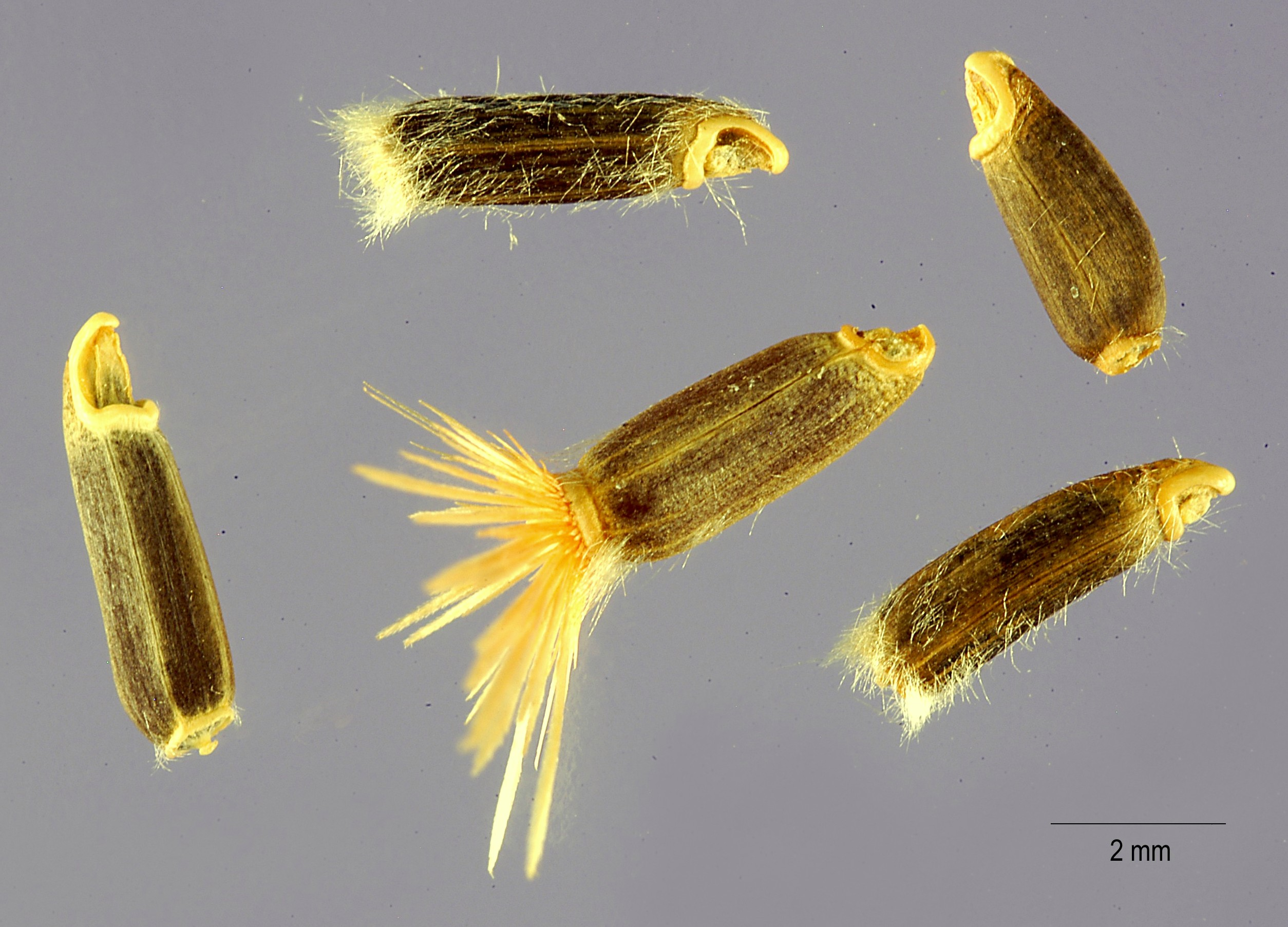 Amberboa moschata, originalmente Centaurea moschata: cipselas sueltas.